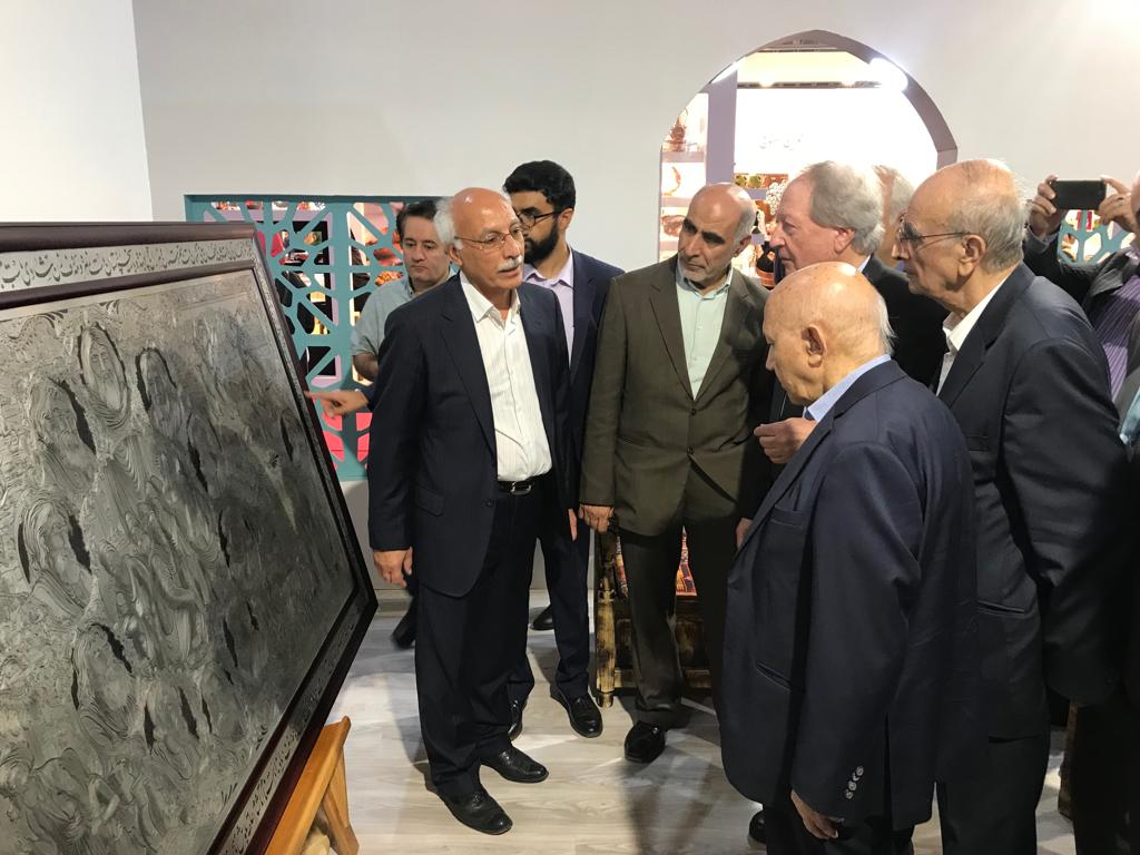 حضور دکتر الهی قمشه ای و اثر مشاهیر استاد الیاسی